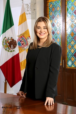 Fotografía oficial de la alcaldesa de Chihuahua, María Eugenia Campos Galván.